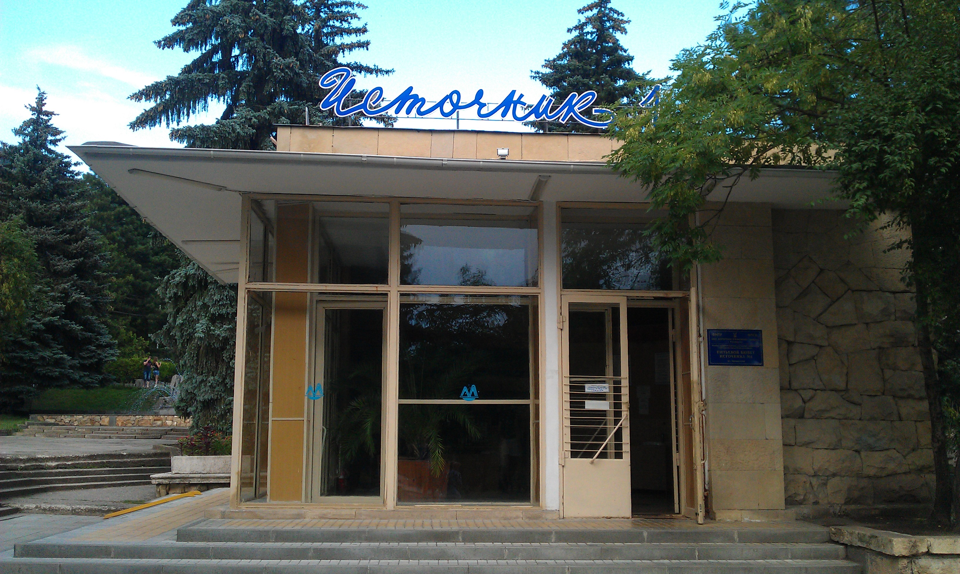 Располагается возле санатория Тарханы